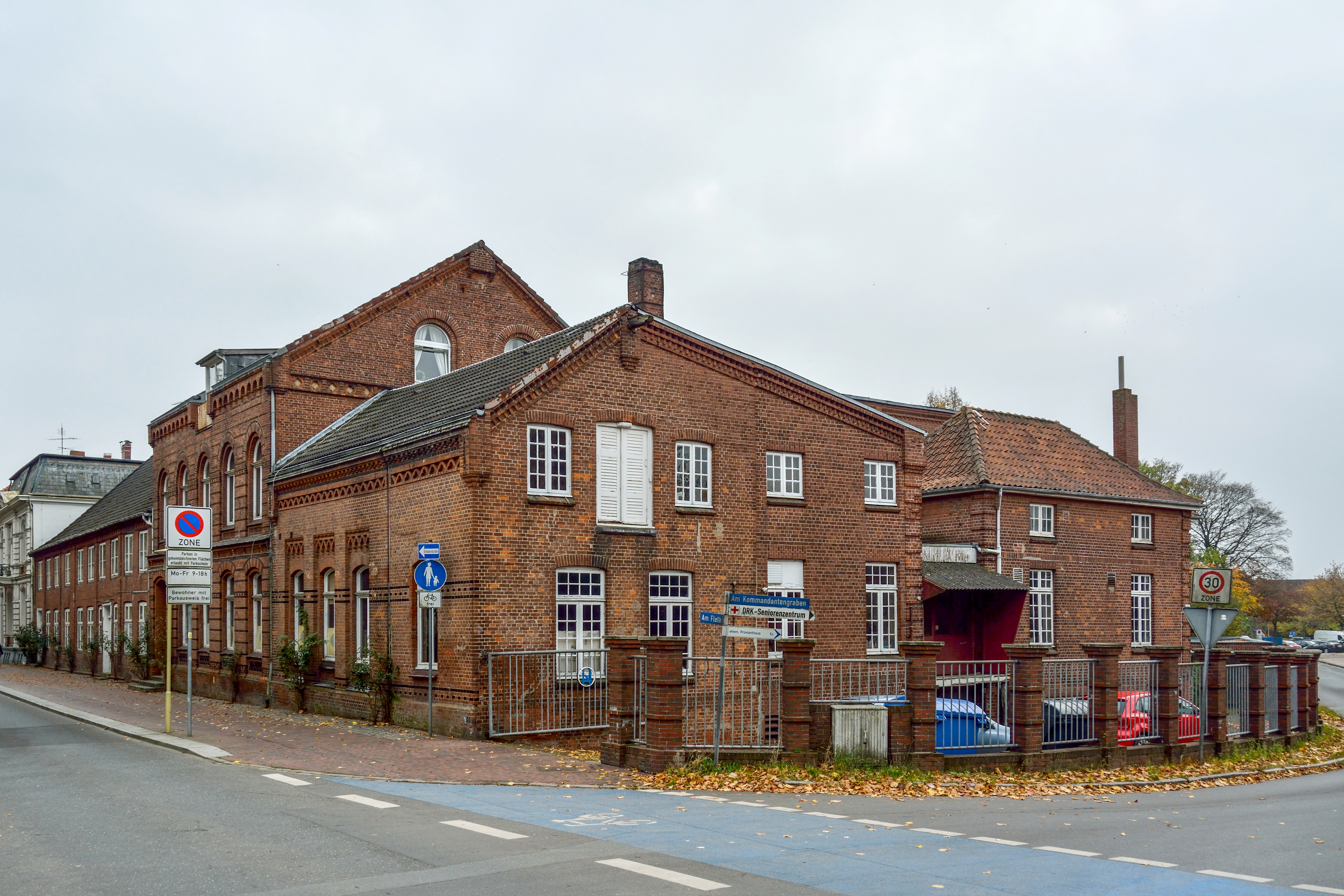 Impressionen der ehemaligen Druckerei J.J. Augustin in Glückstadt Die Druckerei